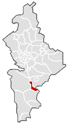 Ubicación geográfica del municipio de Iturbide en el estado mexicano de Nuevo León.